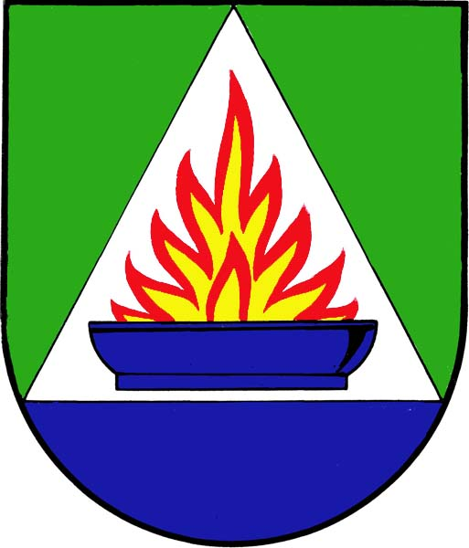 Česky: znak obce Hlubočky